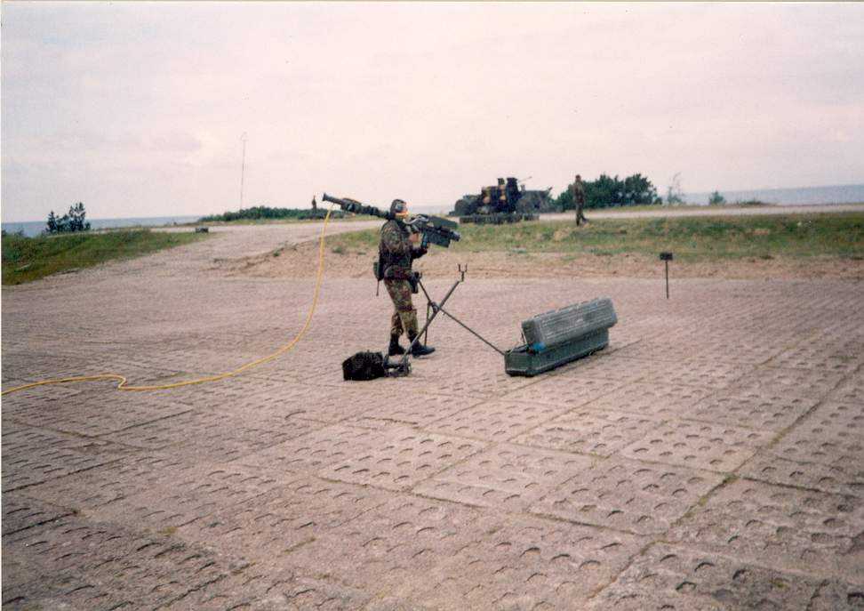 Trenażer wyrzutni rakiet przeciwlotniczych Stringer